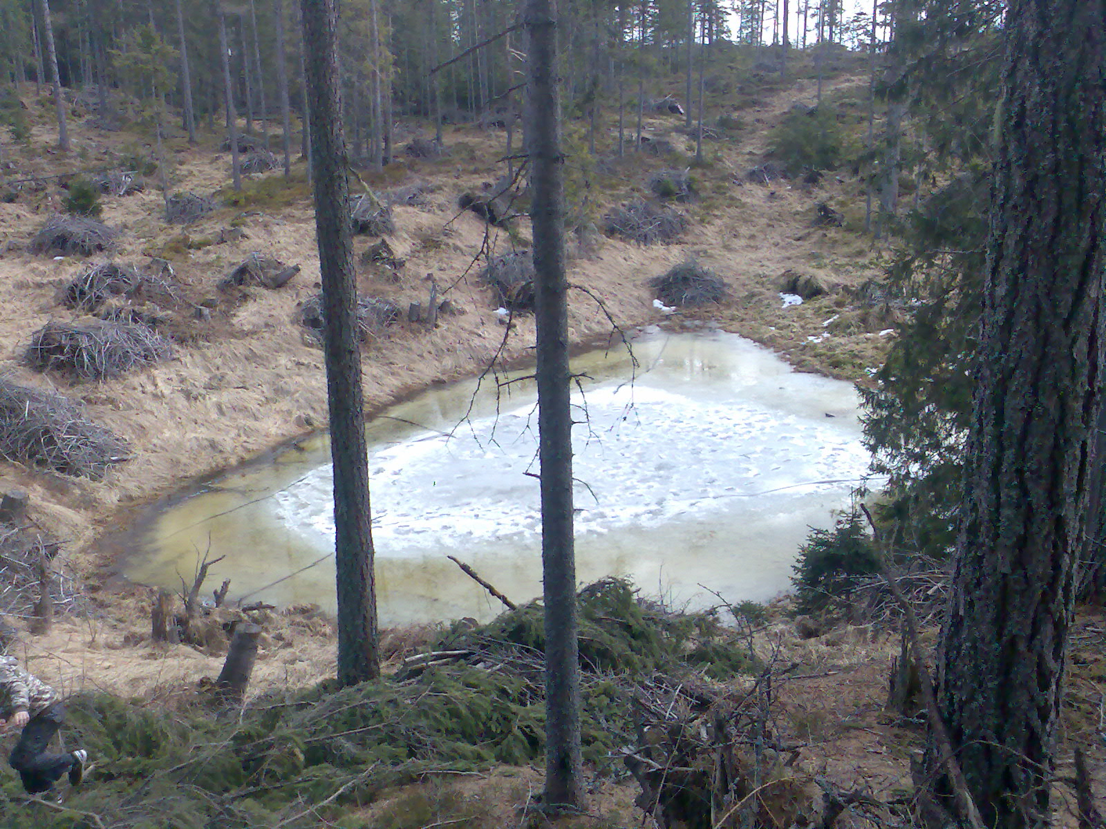 Čierne pleso